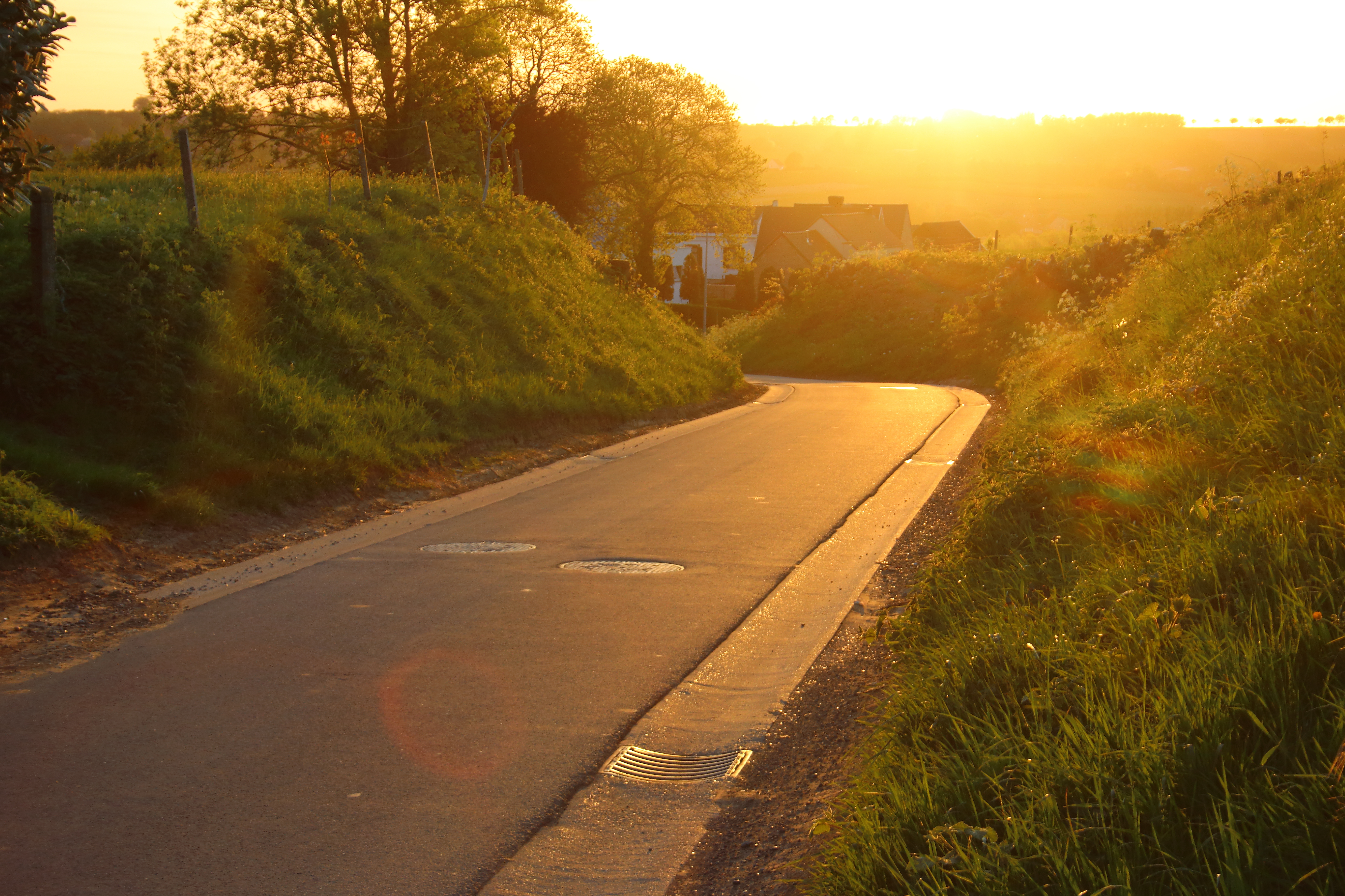 Berendries, Vlaamse Ardennen